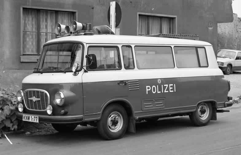 11.-18.8.1991 Bundesland Sachsen-Anhalt Köthen ehemalige VP-Fahrzeuge, Typ Wartburg, Lada, Barkas